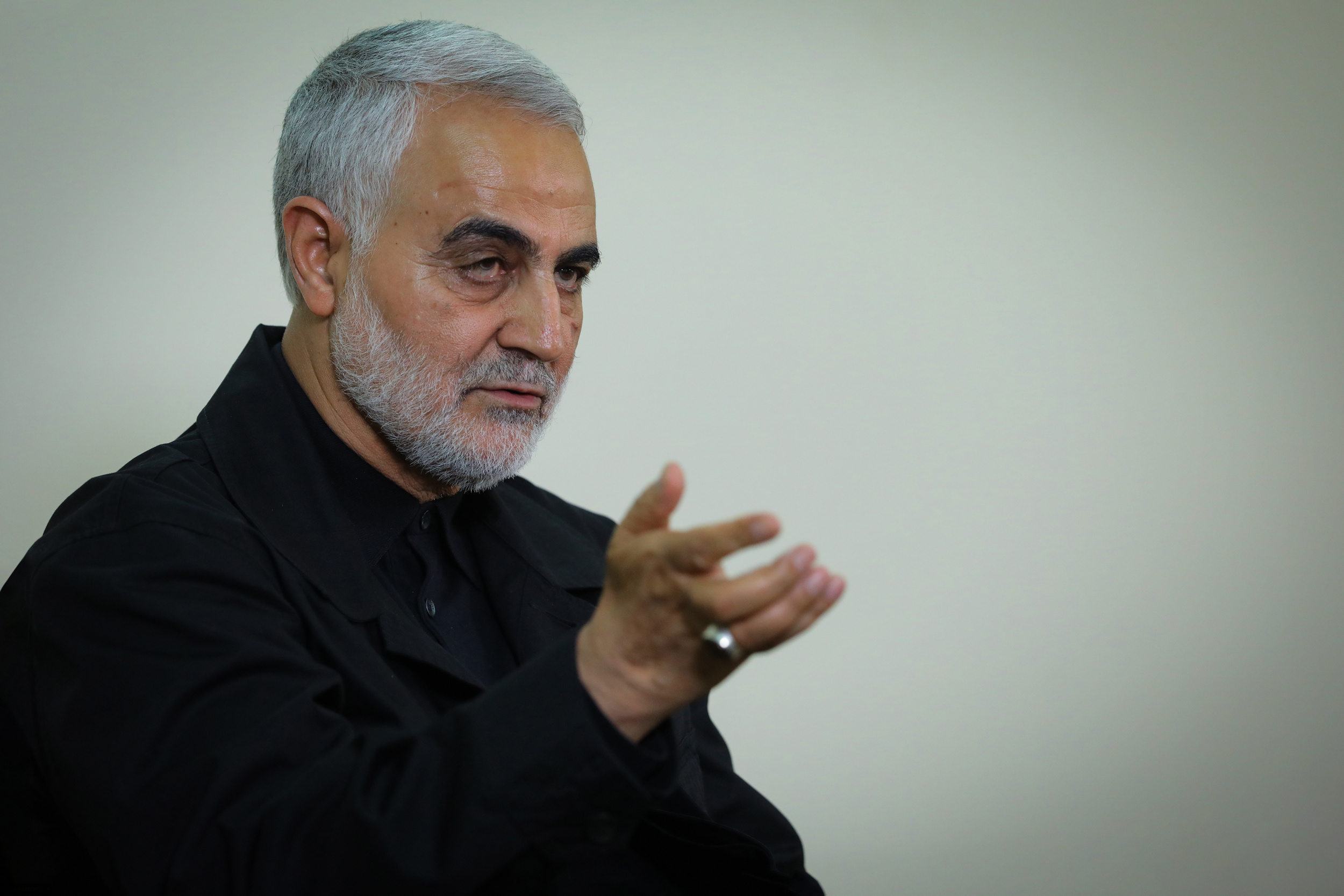 قاسم سلیمانی